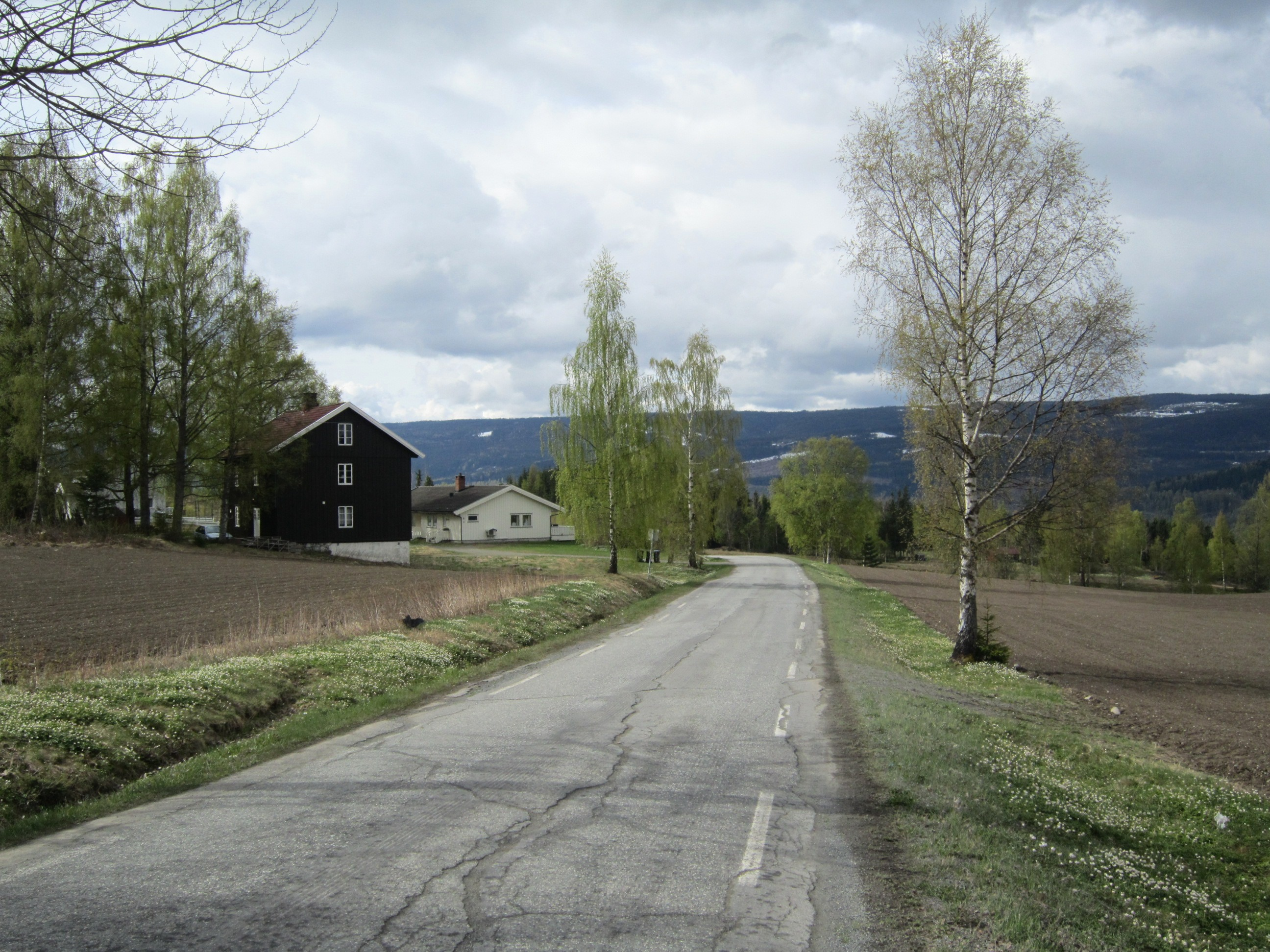 Fylkesvei 2534 (tidl. 321) i Søre Ål